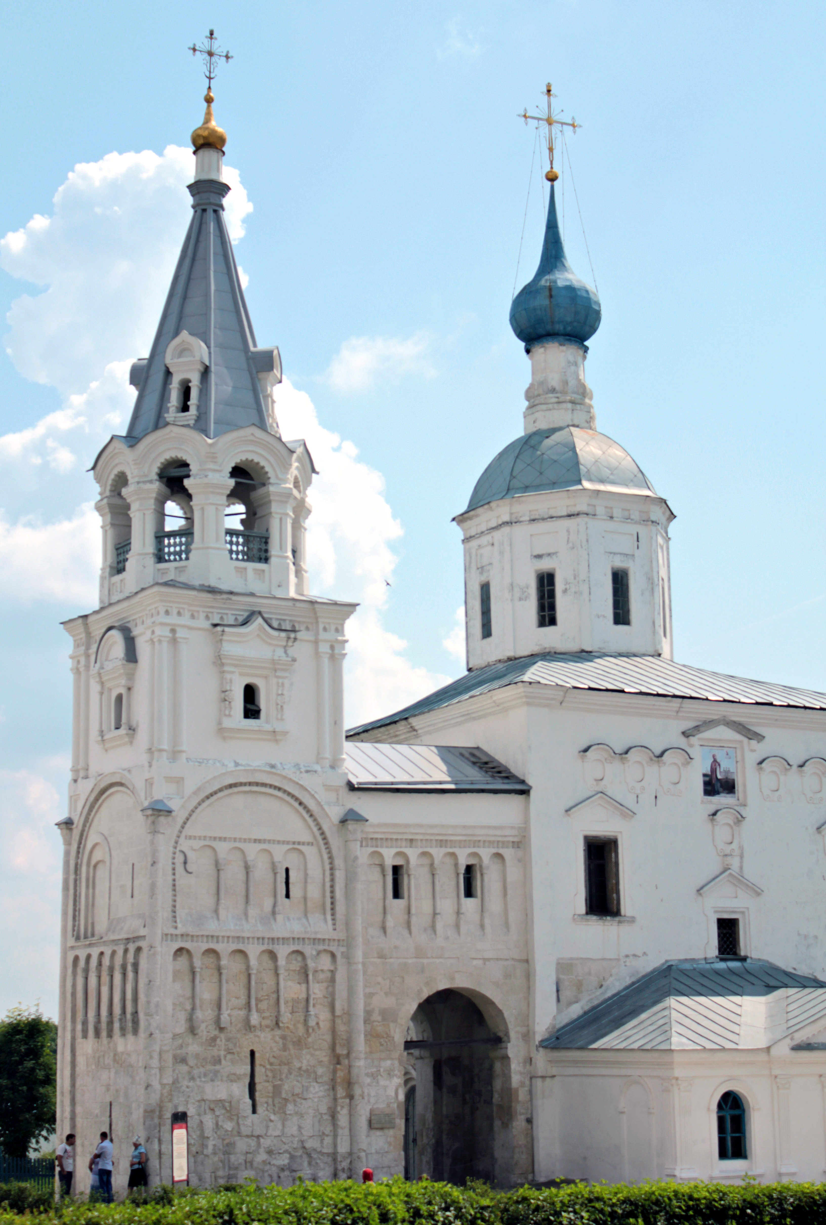 Палаты Андрея Боголюбского (Владимирская область, Владимир, р. п. Боголюбово)